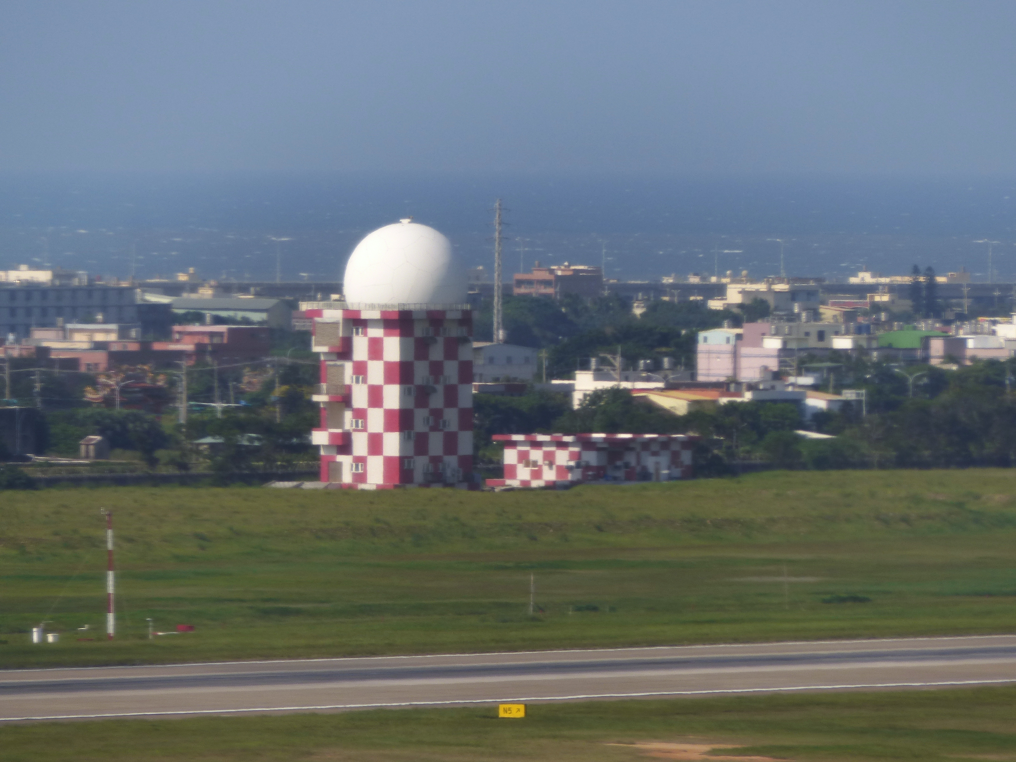 桃園國際機場北側，北跑道中段附近的雷達站。